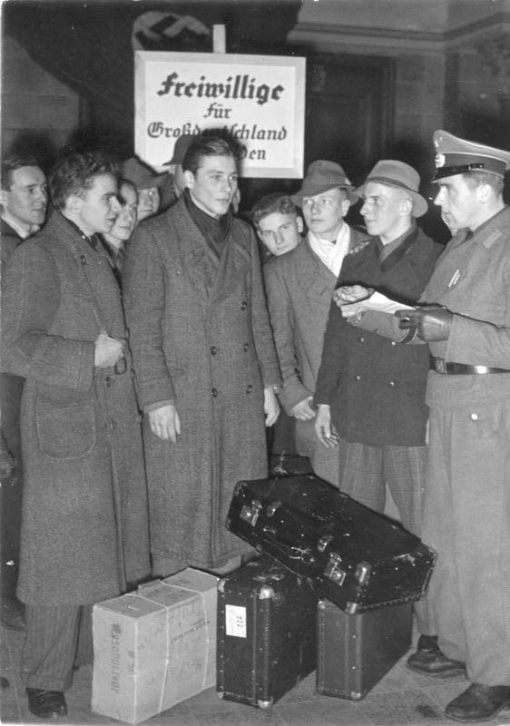 Kriegsfreiwillige rücken bei der Panzergrenadier-Division "Großdeutschland" ein Februar 1944 Kriegsfreiwillige sind auf dem Bahnhof eingetroffen und erhalten ihre ersten Anweisungen. A 126 050 E.M. Orbis